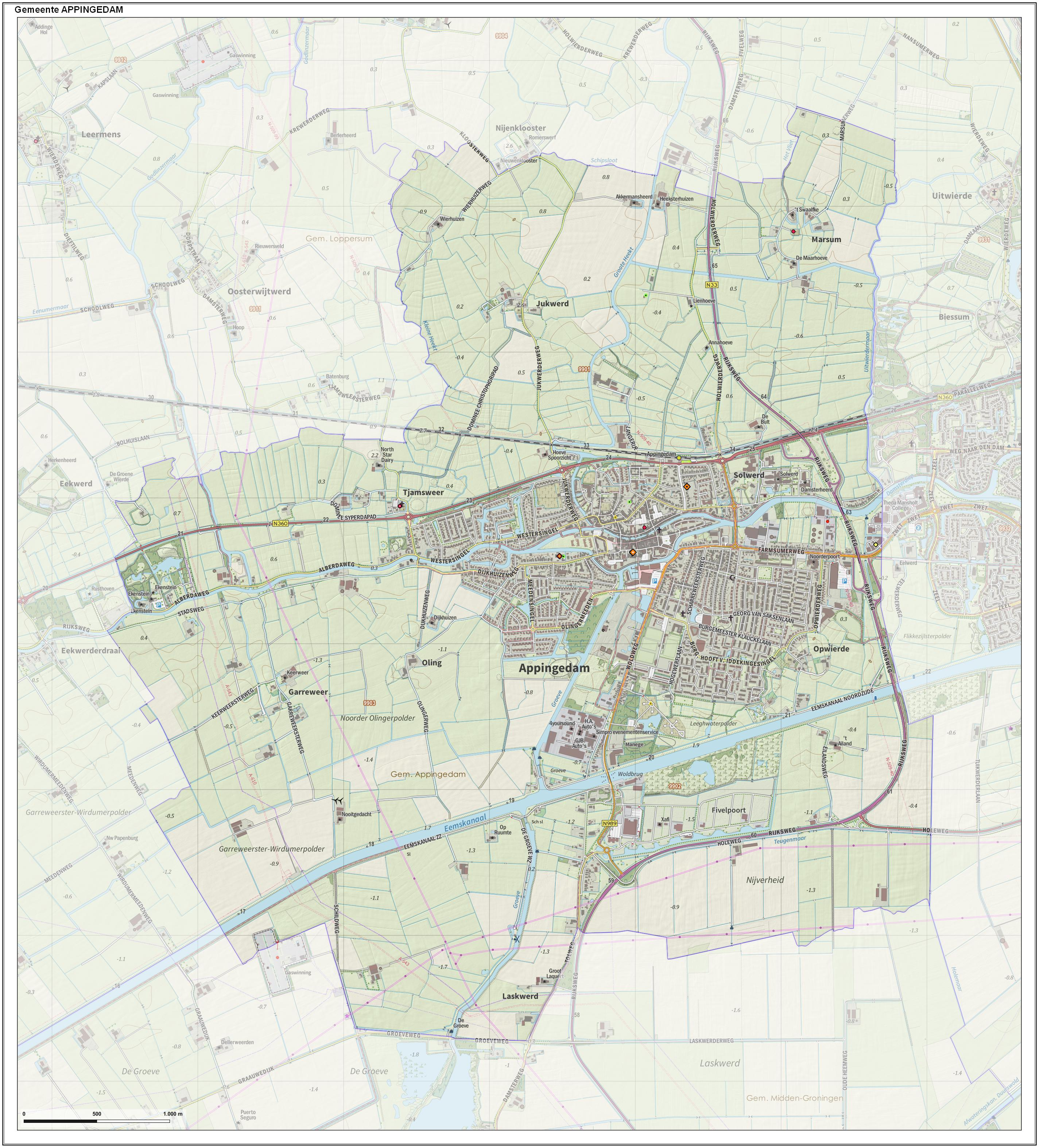 Topografische gemeentekaart. Resolutie: 400 pixels/km. Kaartbeeld samengesteld uit de open geodata van de Top10NL en Top25namen (Kadaster), Creative Commons-BY licentie. Gebouwvlakken uit open geodata BAG extract. Wegen uit de OpenStreetMap, OpenStreetMap community. Reliëfschaduw uit de Actuele Hoogtekaart AHN2. Samenstelling en kleurenschema: Jan-Willem van Aalst, met QGIS. Zie ook de Legenda.